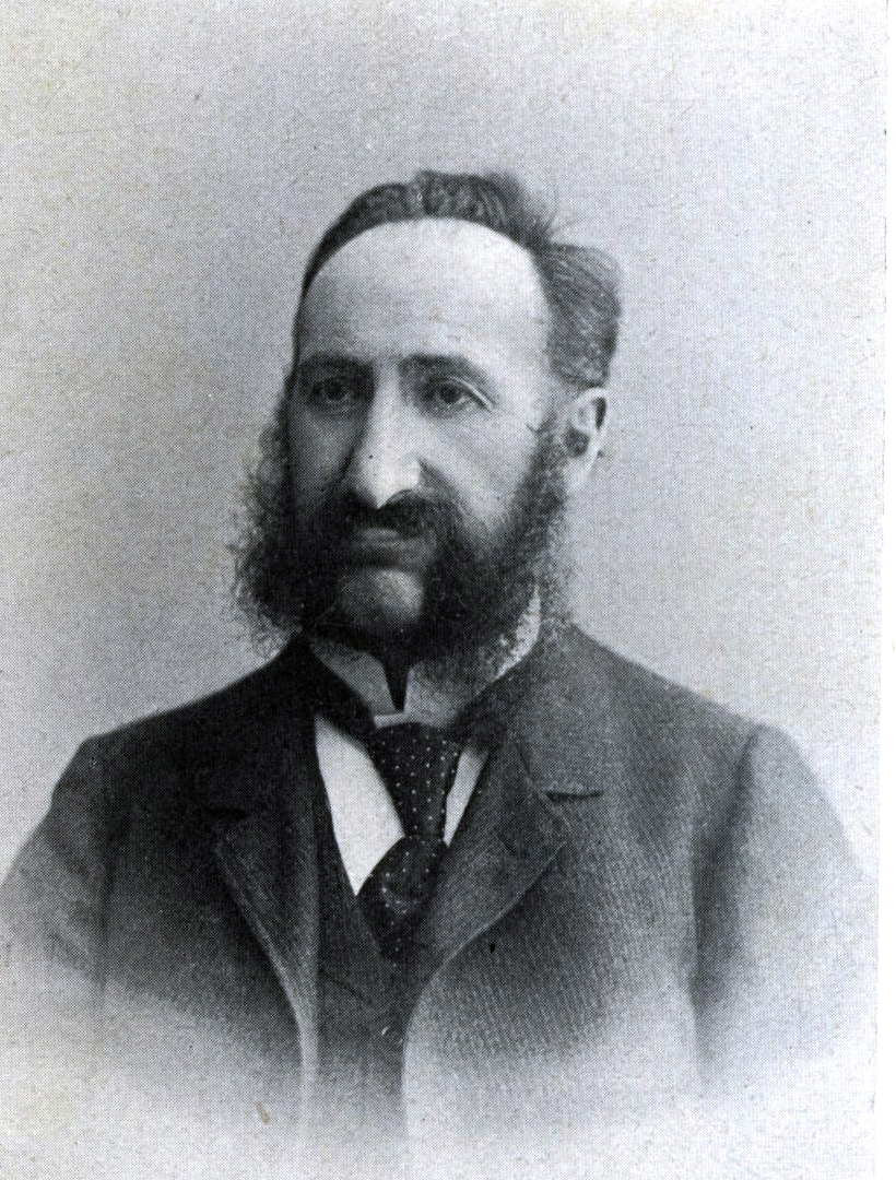 Фальк, Рафаил Александрович